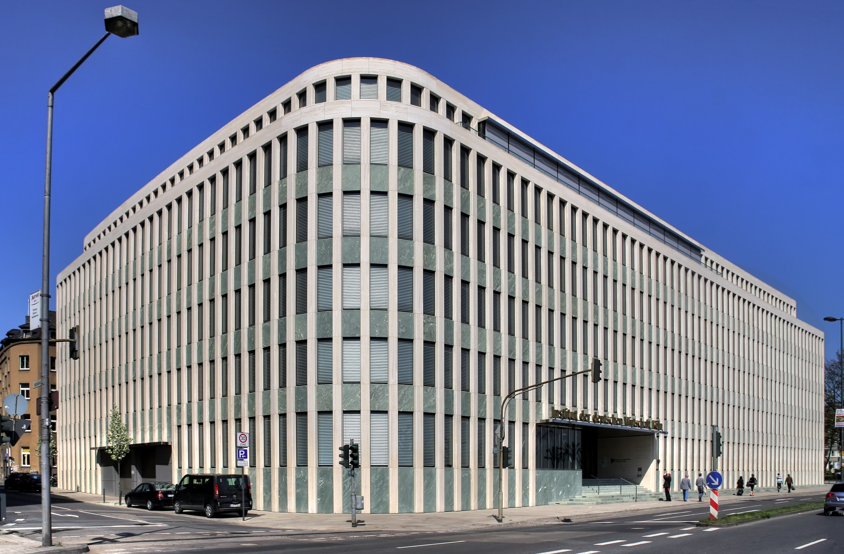 Institut der deutschen Wirtschaft, Konrad-Adenauer-Ufer 21, 50668 Köln. Architekt: Thomas van den Valentyn